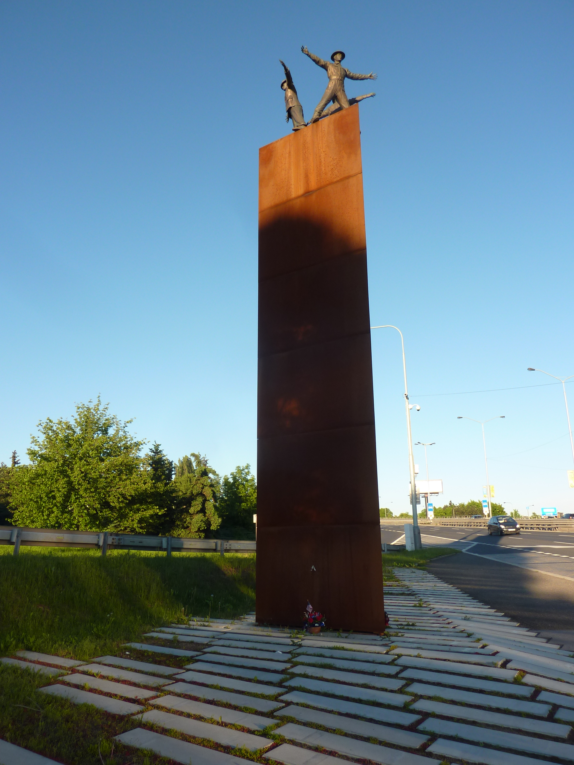 Památník Operace Anthropoid s vrcholem ozářeným zapadajícím sluncem